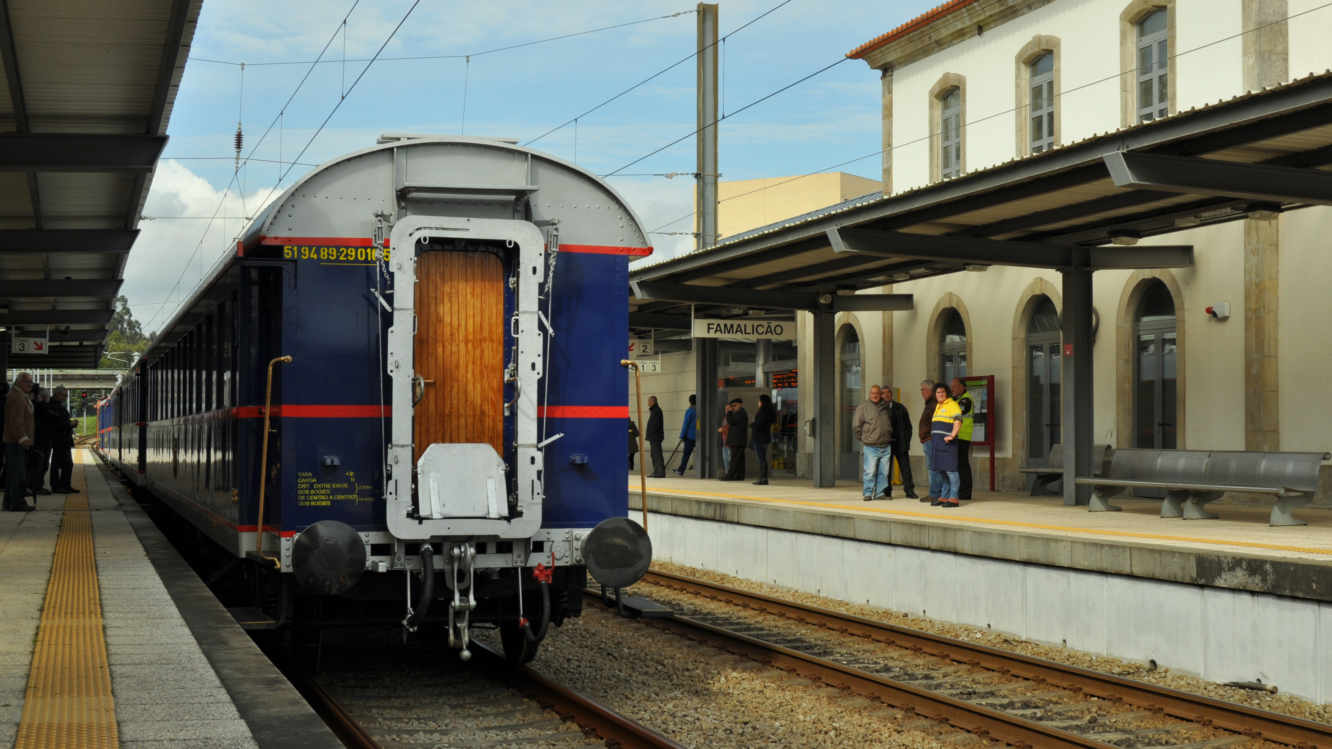 Comboio Presidencial - Famalicão